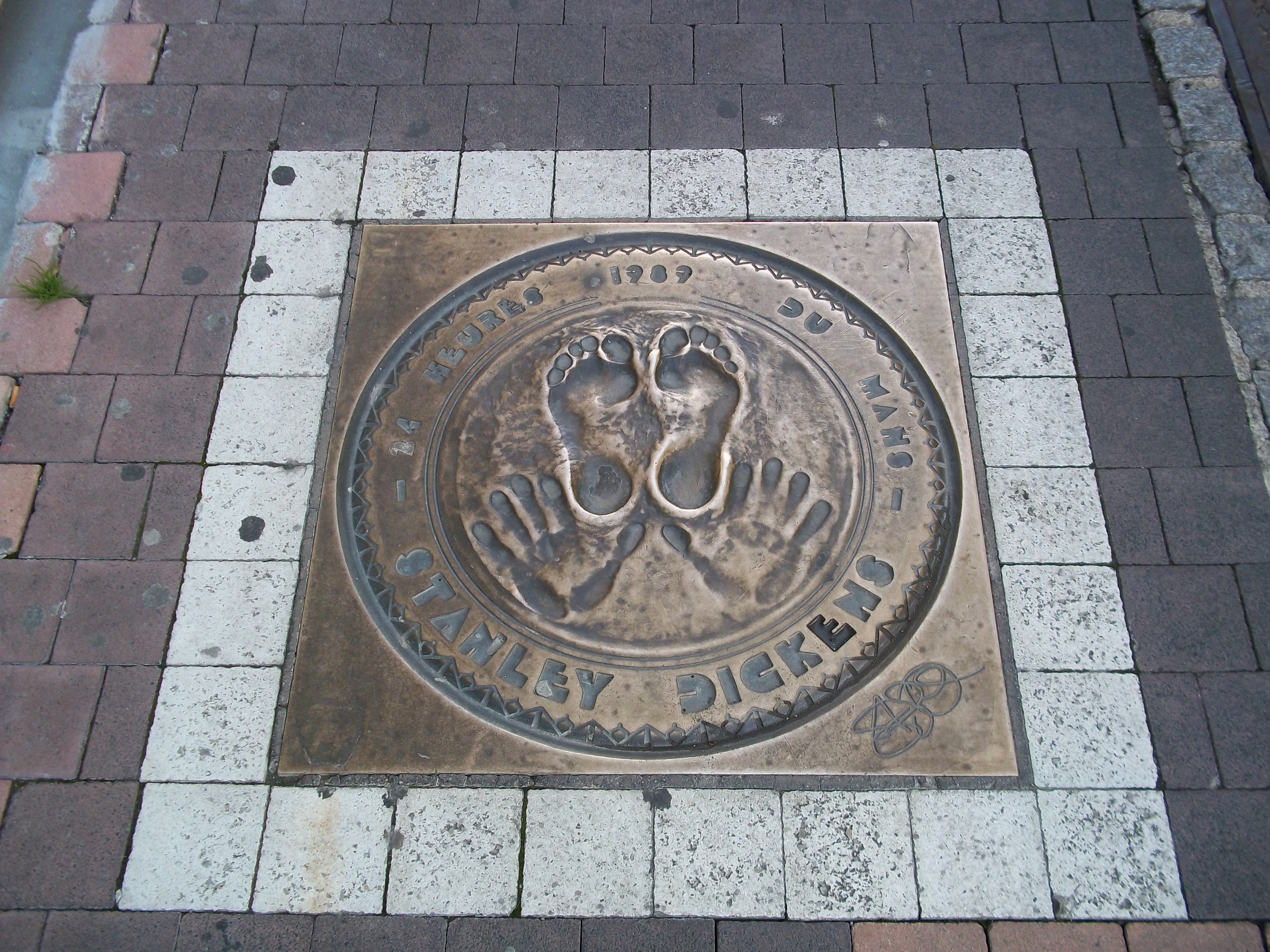 Plaque bronze des empreintes de S.Dickens, Pilote vainqueur 1989 des 24 heures du Mans